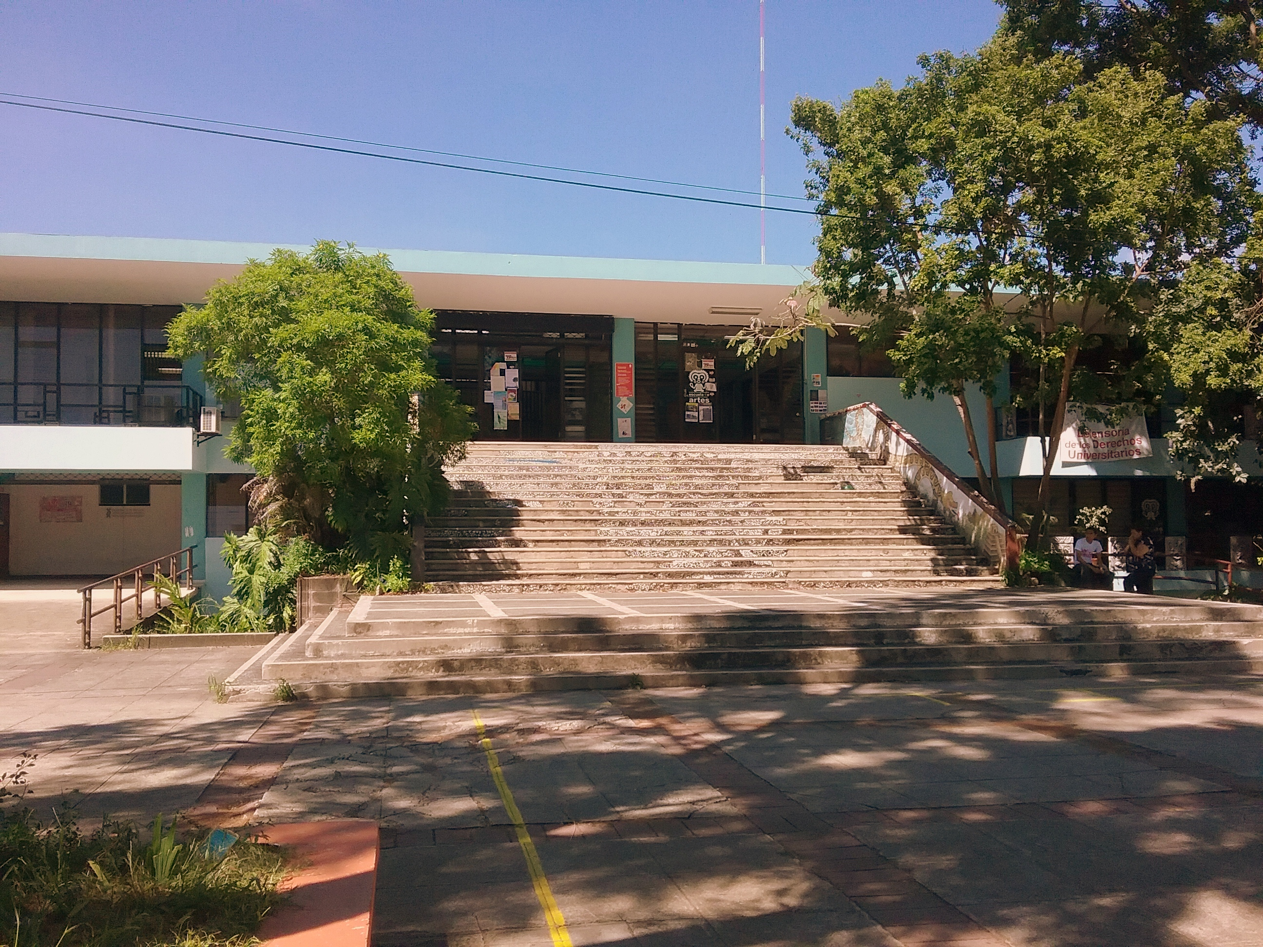 Edificio de la Escuela de Arte y Cultura, Facultad de Ciencias y Humanidades de la Universidad de El Salvador.